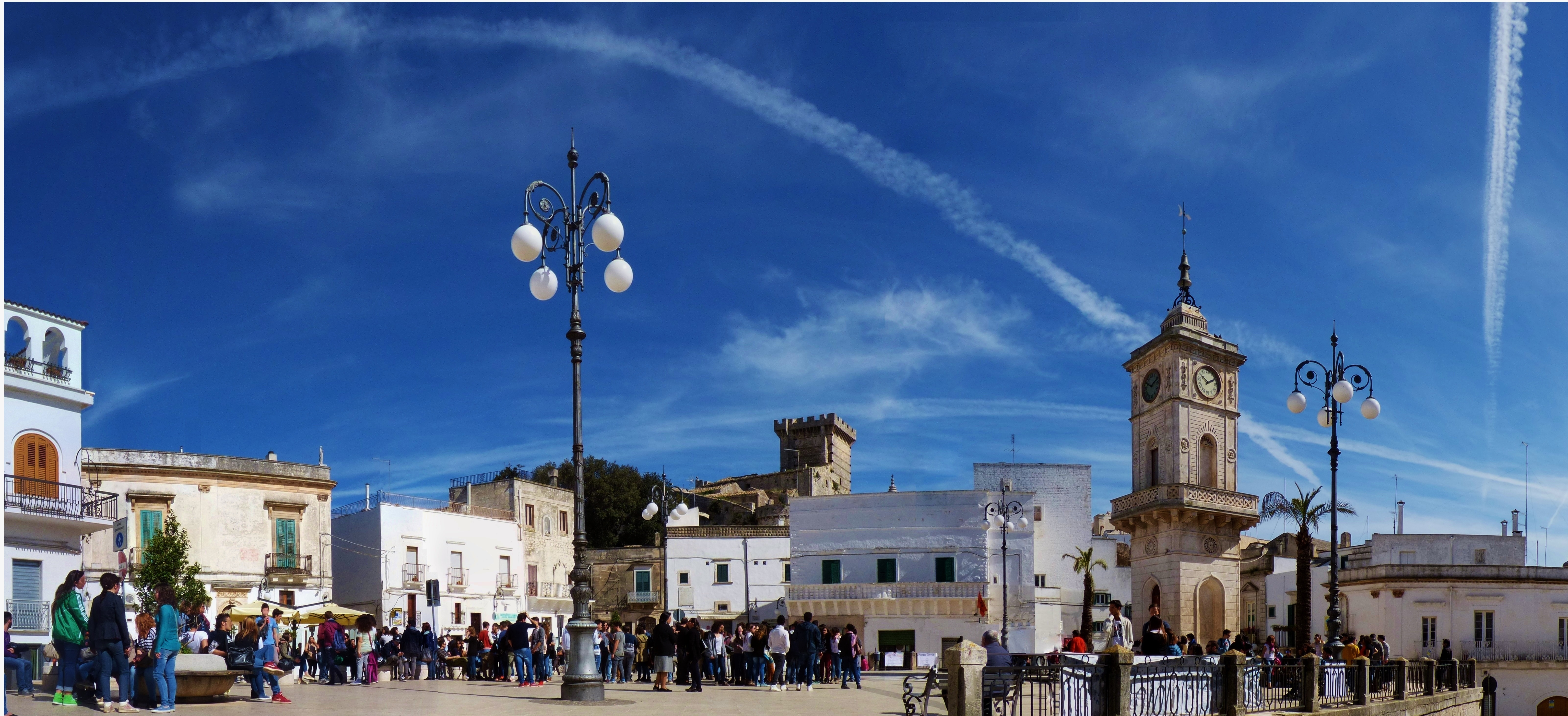 La piazza centrale di Ceglie, si vedono tra gli altri uno scorcio del Castello e la Torre dell'Orologio